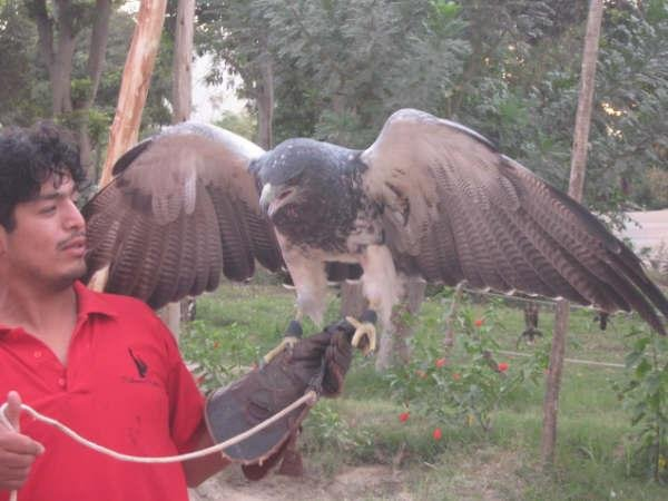 Jorge Luis Medrano y su Aguila en Peru